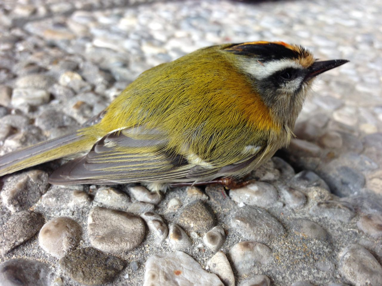 Sommergoldhähnchen (Regulus ignicapilla)